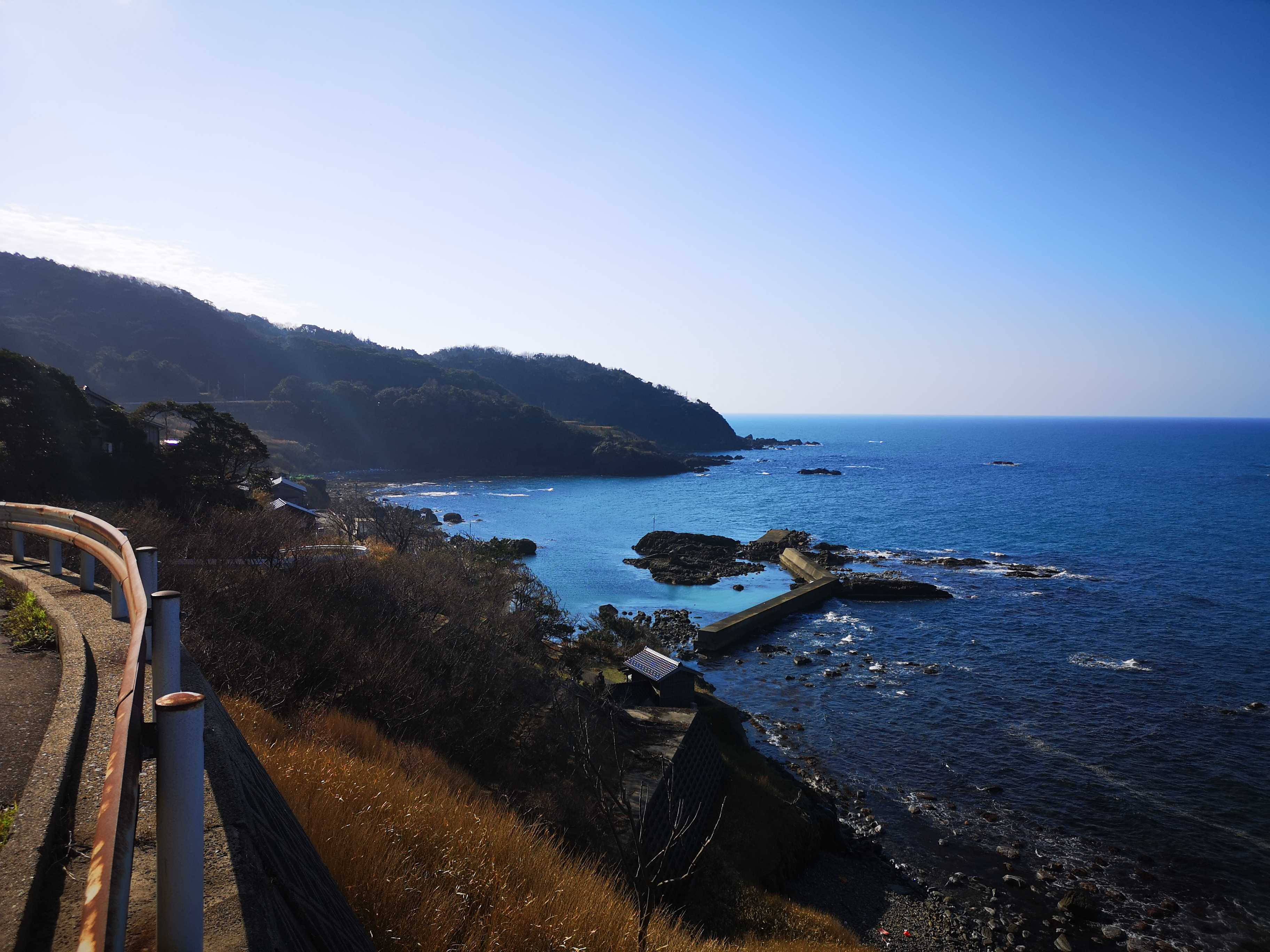 浅茂川方面から臨む 京丹後市網野町磯地区